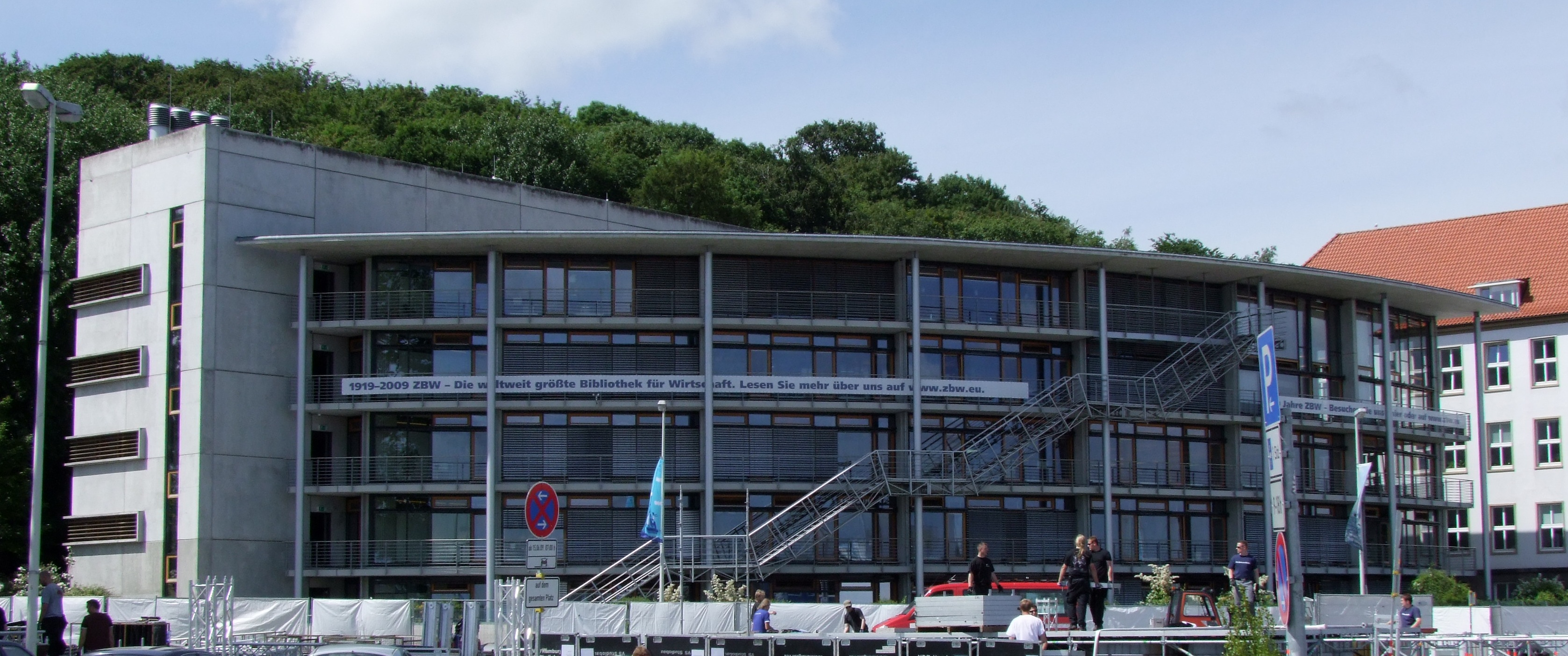 Außenansicht der ZBW in Kiel